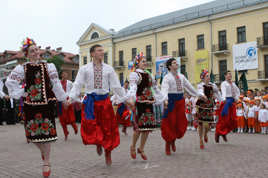 Фестивалі у Кам’янці-Подільському